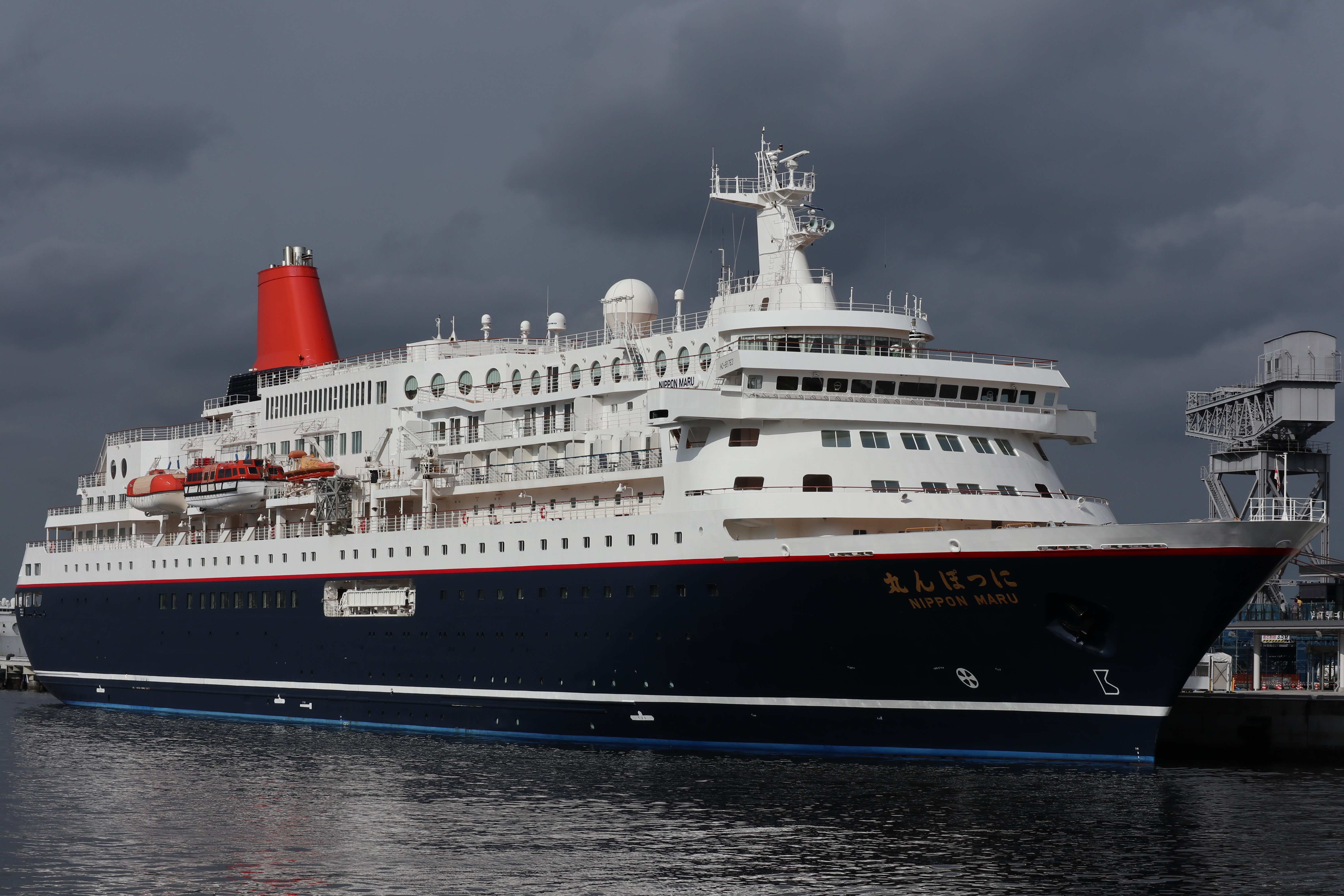 （第二回大改装後、横浜港に停泊するにっぽん丸）